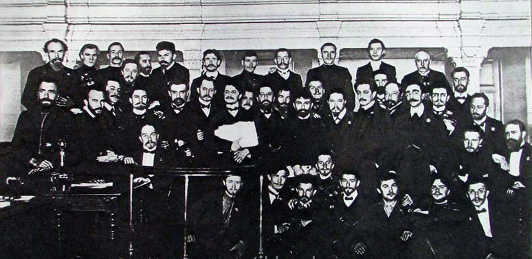 Совет рабочих депутатов Петербурга (1905); Троцкий стоит в центре, с документами